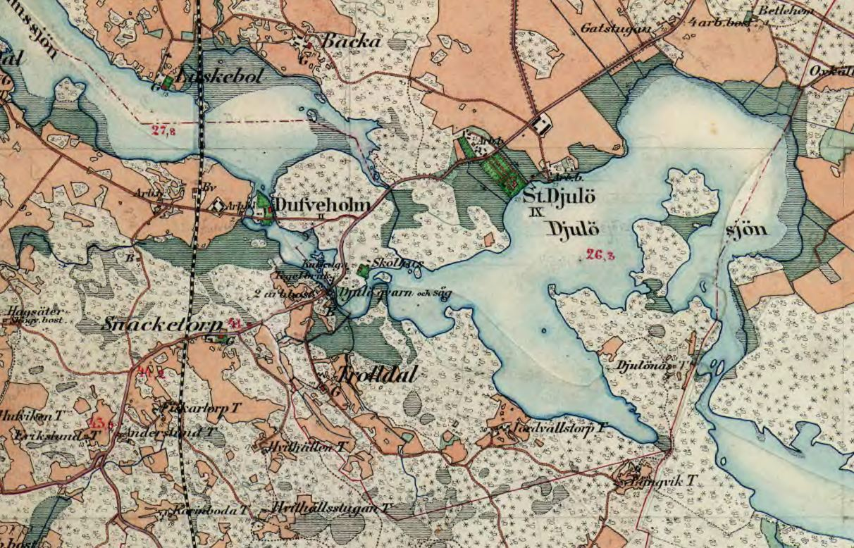 Duveholm och Stora Djulö